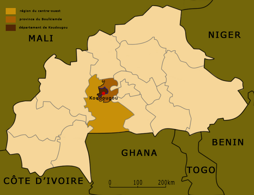 Localisation de Koudougou dans le Burkina, sa région, sa porvince et son département.